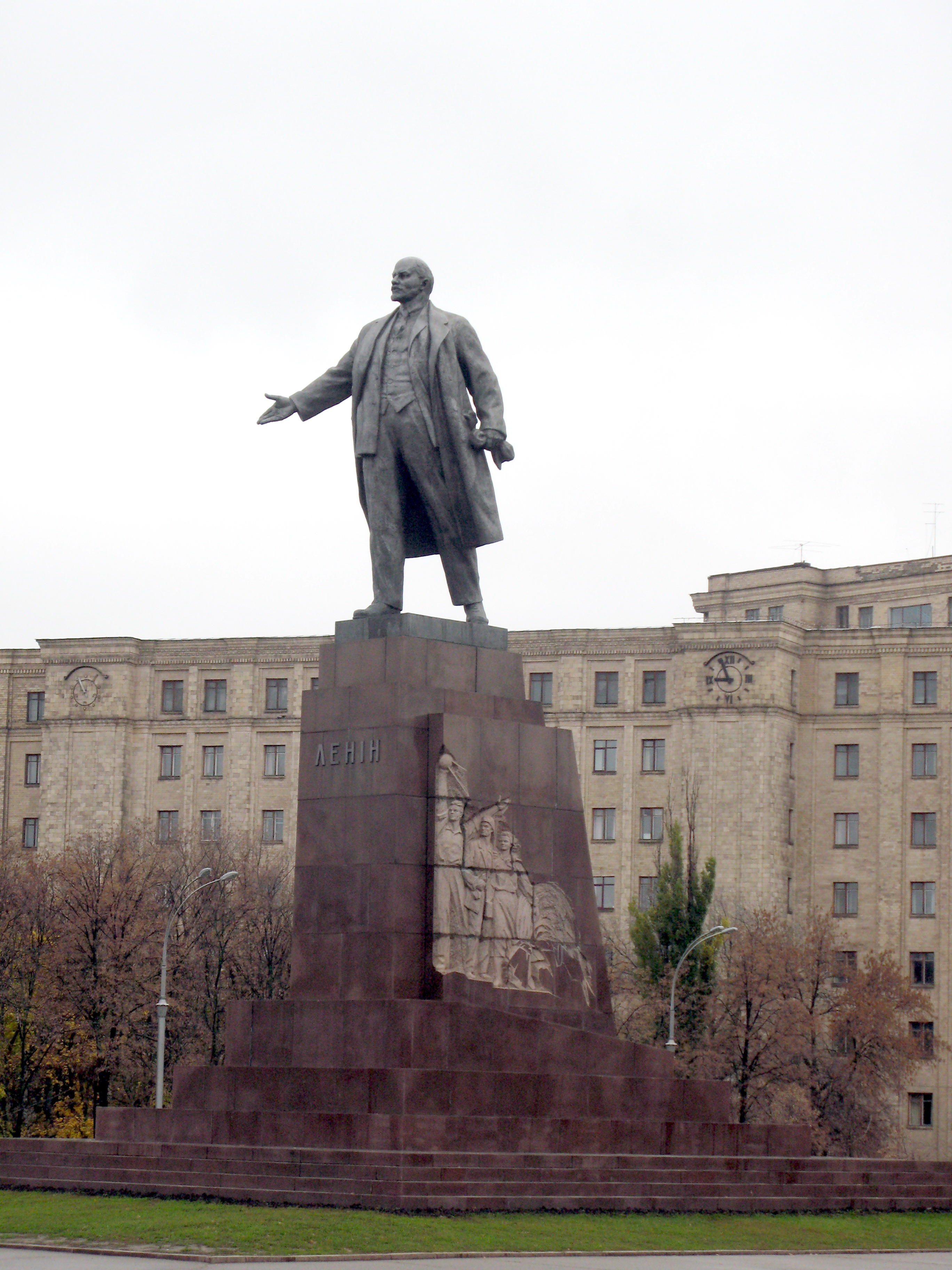 Пам'ятник В.І. Леніну, пл. Свободи (кол. пл. Ф.Е. Дзержинського), Харків